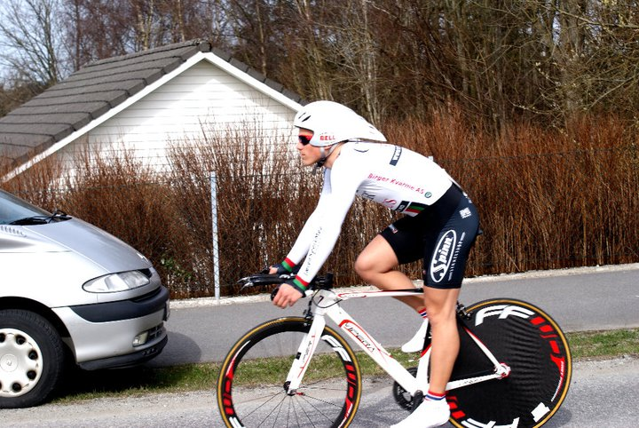 The Animal klar for start.